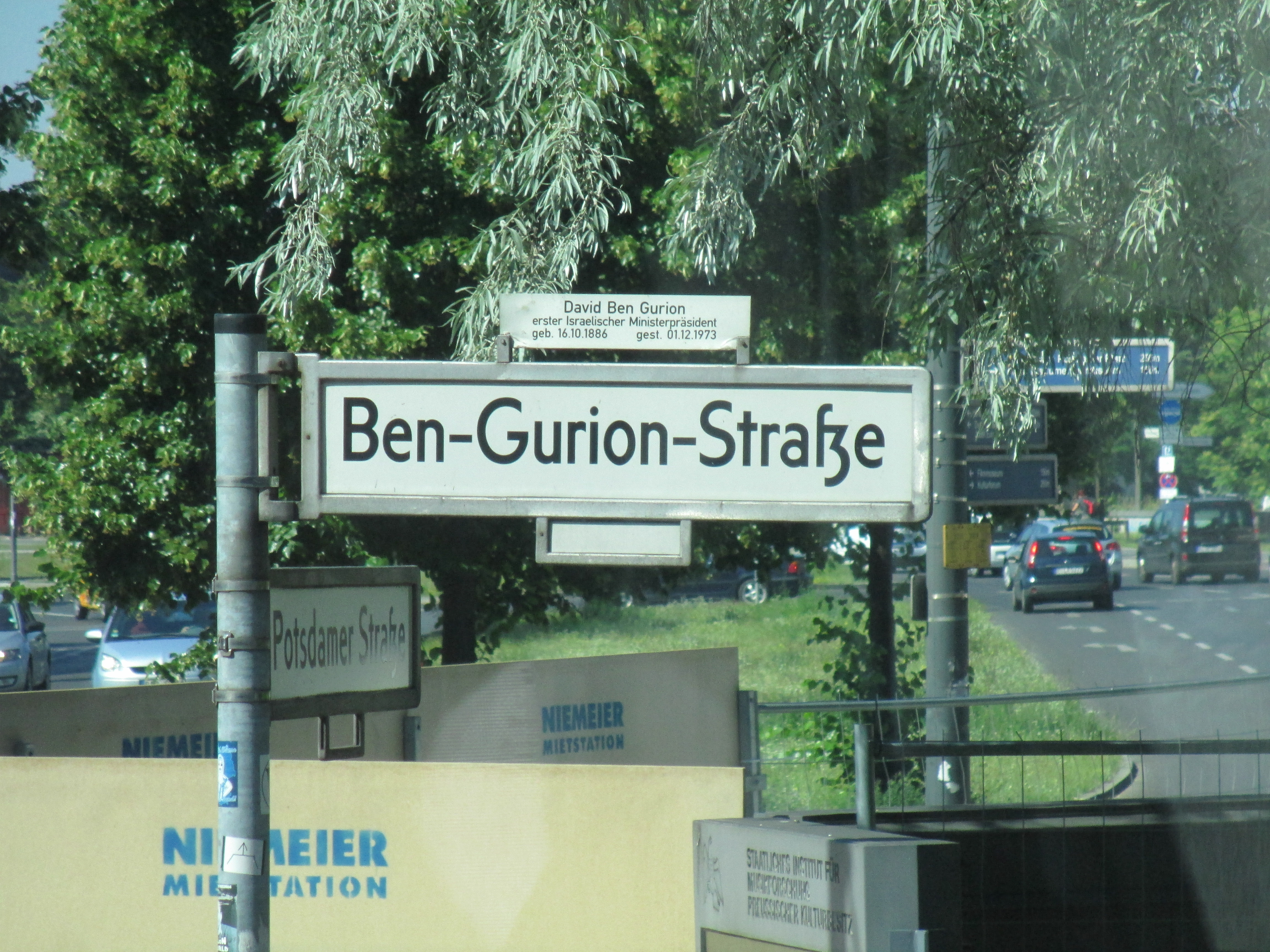 רחוב בן גוריון בברלין